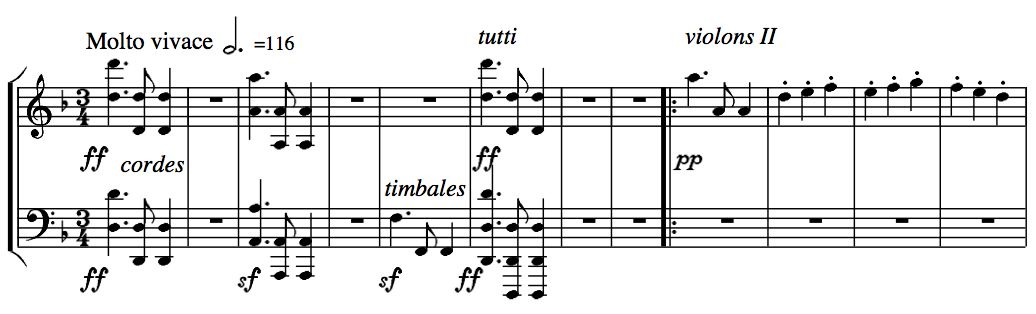 Beethoven, 9e symphonie, 2me mouvement, premières mesures du thème A